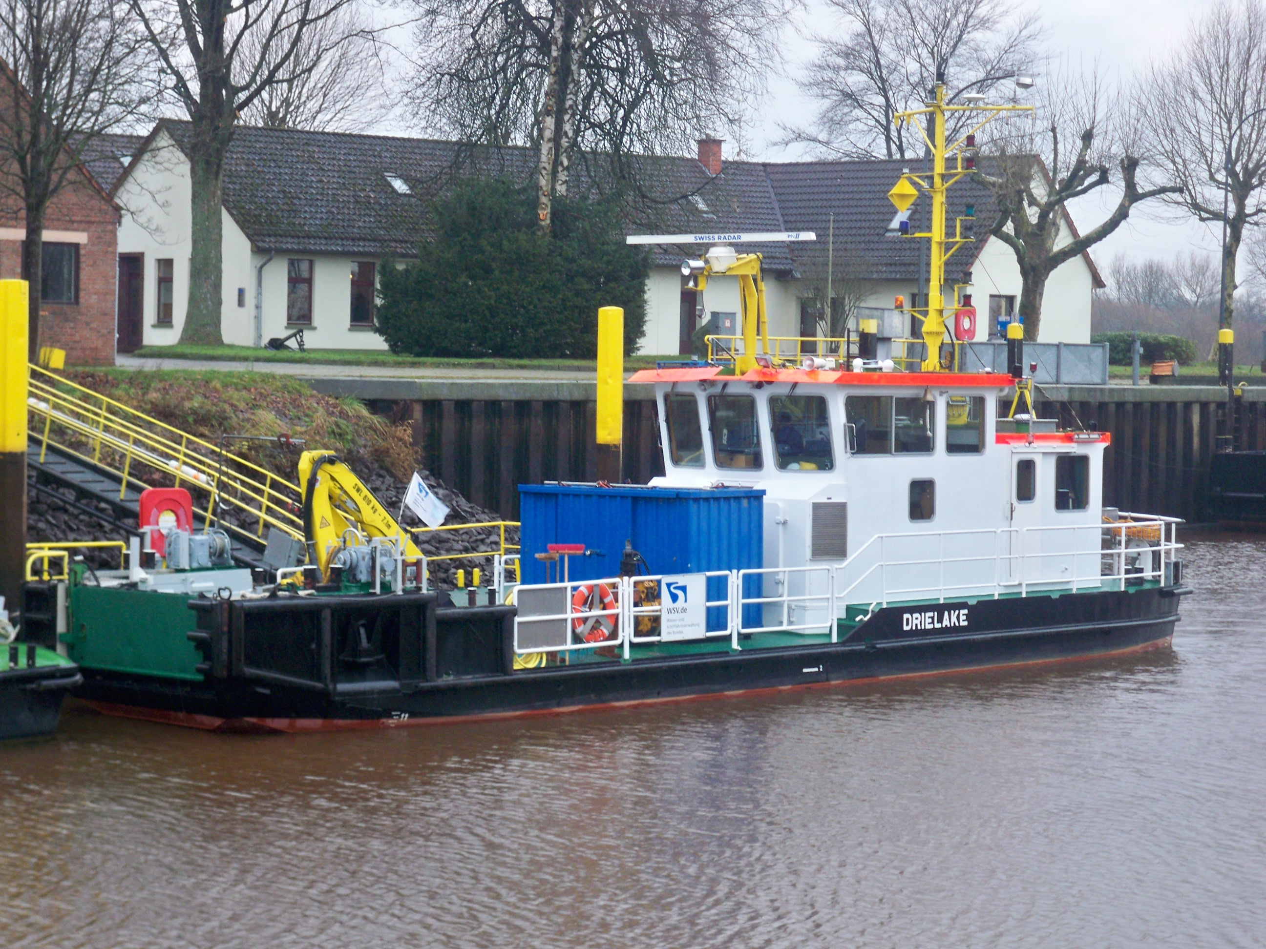 Arbeitsschiff Drielake des WSA Bremen am Liegeplatz des Außenbezirks Oldenburg